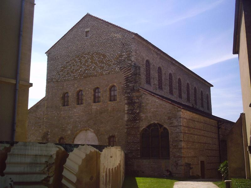 Metz abbaye saint pierre aux Nonnains.